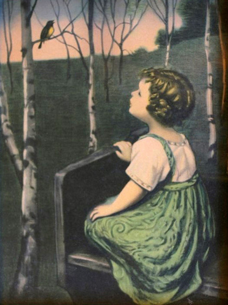 Frühlingsliedtitle QS:P1476,de:"Frühlingslied" label QS:Lde,"Frühlingslied"